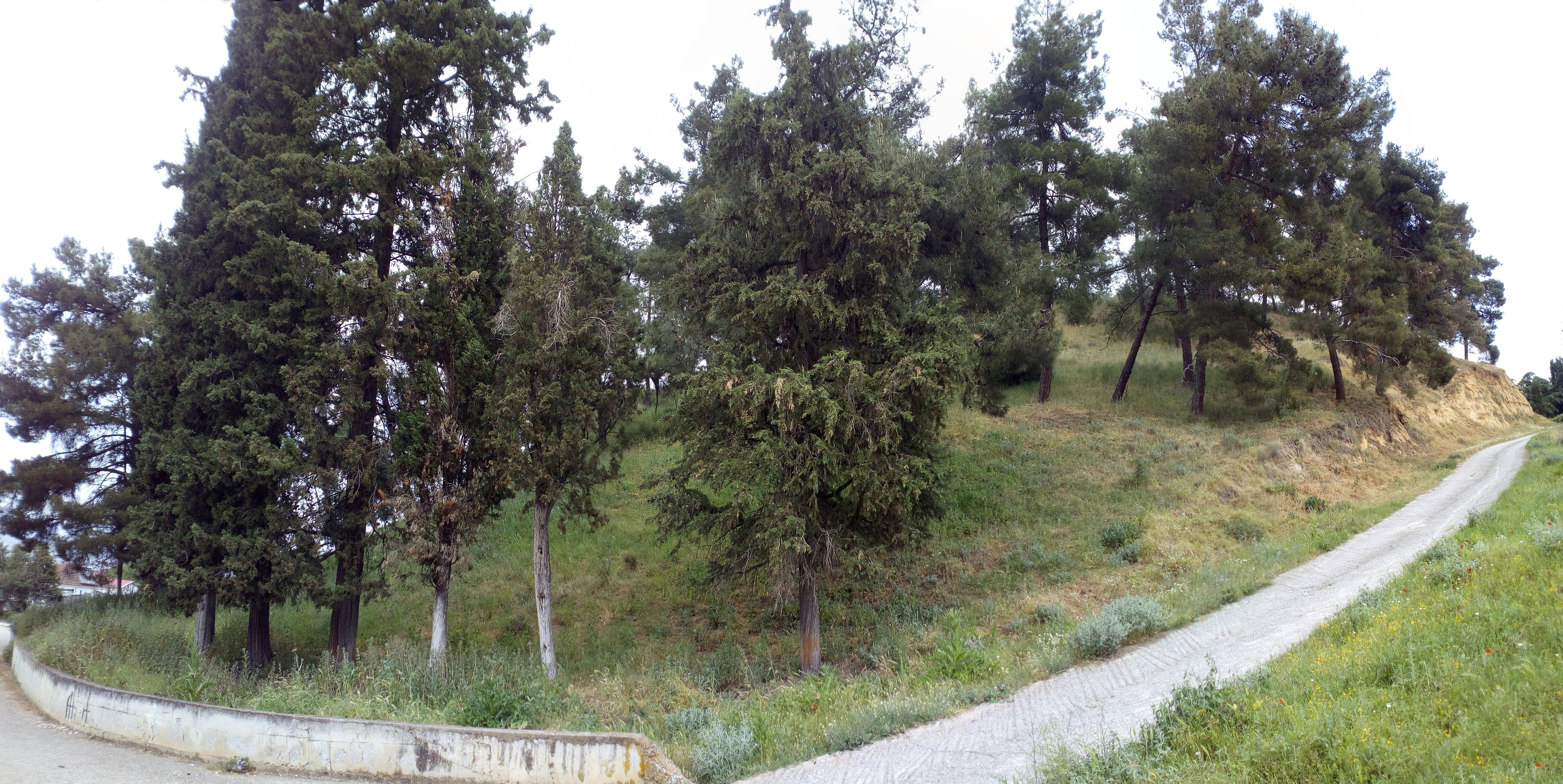 Λόφος νοτιοανατολικά του χωριού.